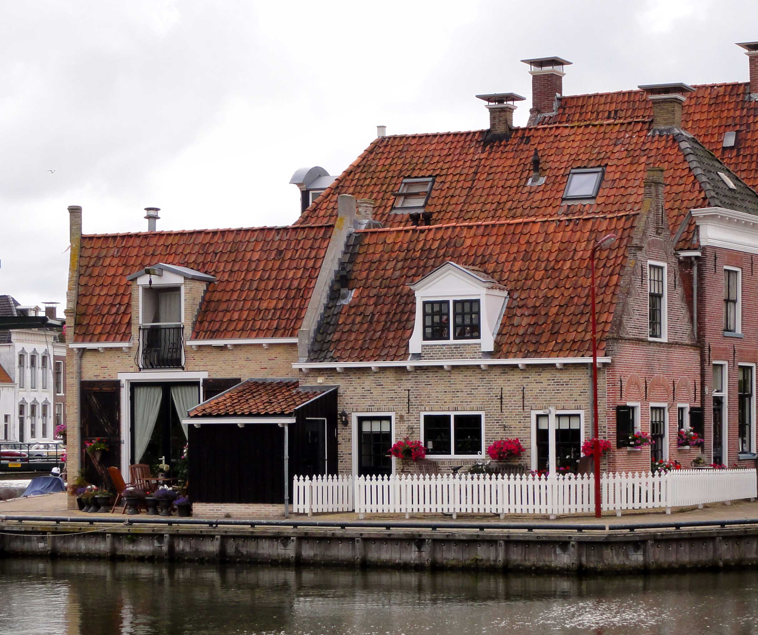 Pruikmakershoek 18 te Makkum